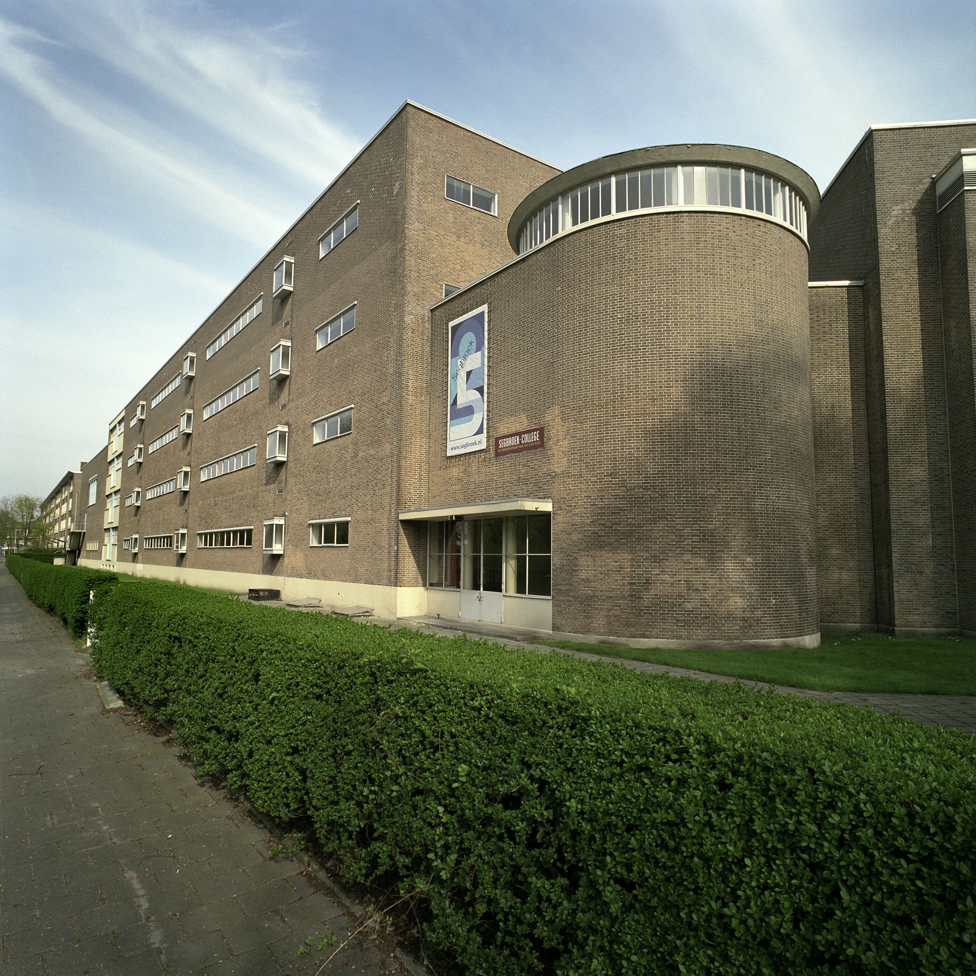 Voormalig Tweede Vrijzinnig Christelijk Lyceum: Overzicht van het schoolgebouw, gezien vanaf de straat